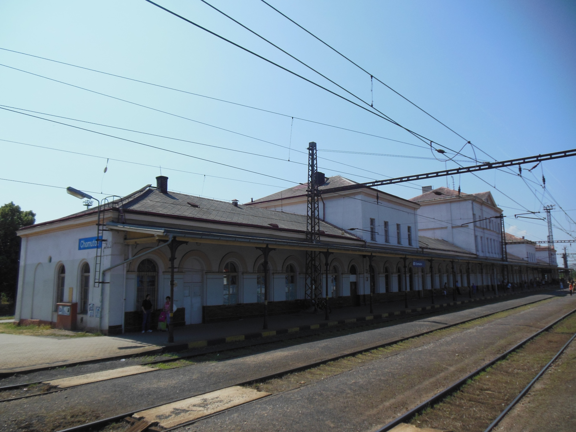 Železniční stanice v Chomutově.